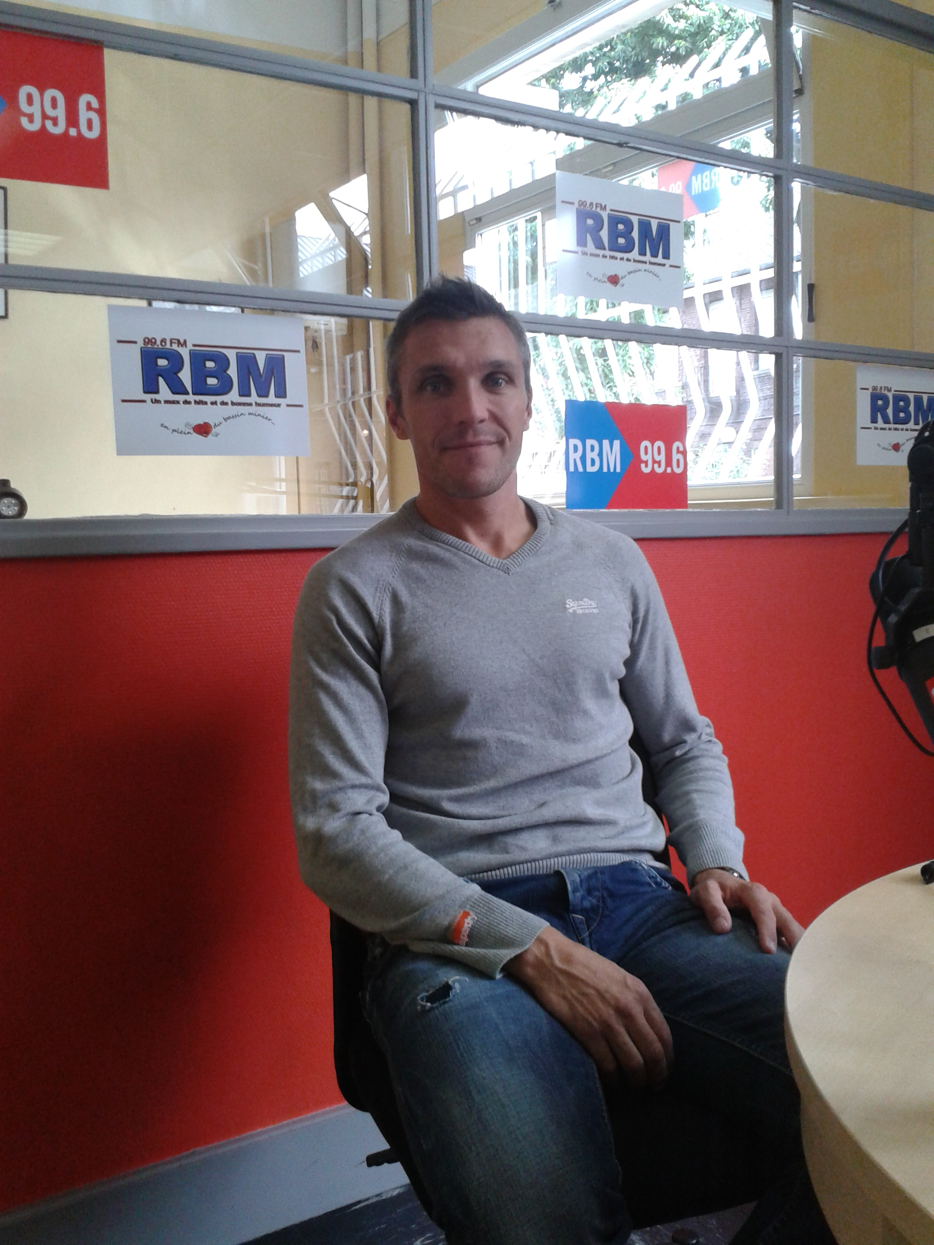 Frédéric Soyez, lors de son passage à la radio RBM 99.6 FM dans l'émission "En Pleine Lucarne", le samedi 21 septembre 2013